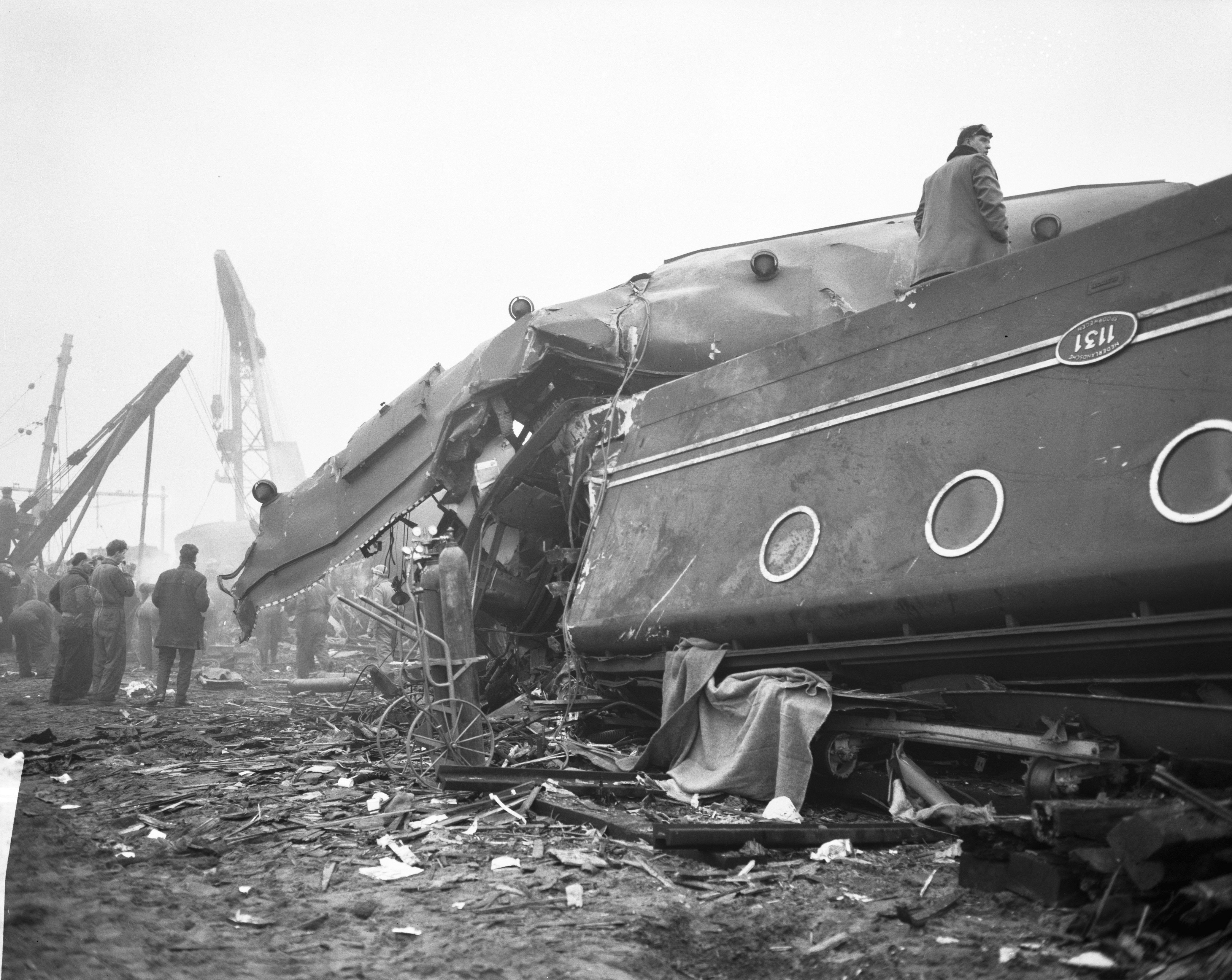 Collectie / Archief : Fotocollectie Anefo Reportage / Serie : Treinramp bij Harmelen Beschrijving : Overzicht van de ravage Annotatie : Door een menselijke fout botsten bij Harmelen de sneltrein Utrecht-Rotterdam tegen de stoptrein Rotterdam-Amsterdam. Er vielen 93 doden Datum : 8 januari 1962 Locatie : Harmelen, Utrecht (provincie) Trefwoorden : overzichten, treinen, treinrampen Fotograaf : Bilsen, Joop van / Anefo, [onbekend] Auteursrechthebbende : Nationaal Archief Materiaalsoort : Negatief (zwart/wit) Nummer archiefinventaris : bekijk toegang 2.24.01.04 Bestanddeelnummer : 913-3811